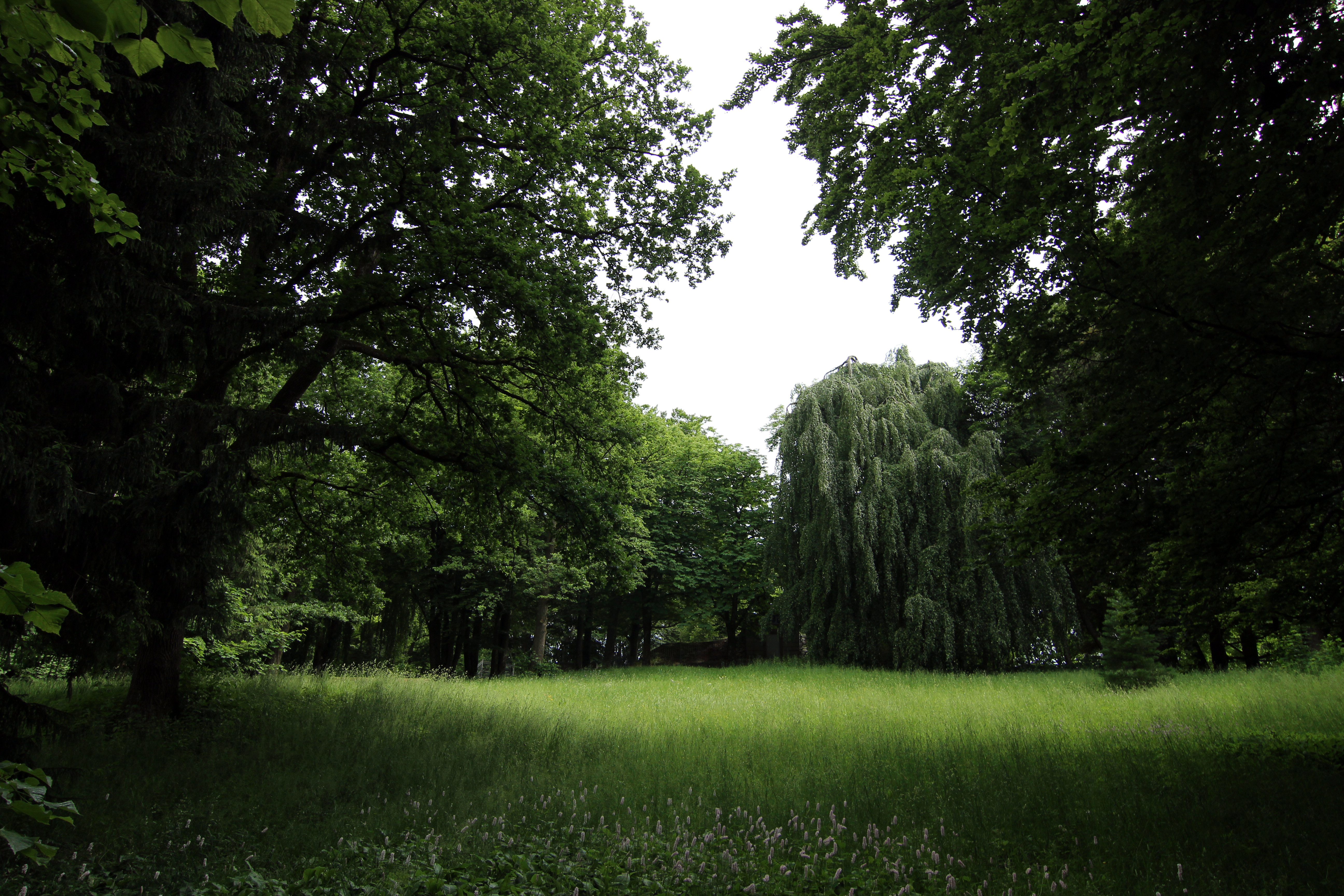 Haubenschloßpark, Blick zum Wasserhochbehälter